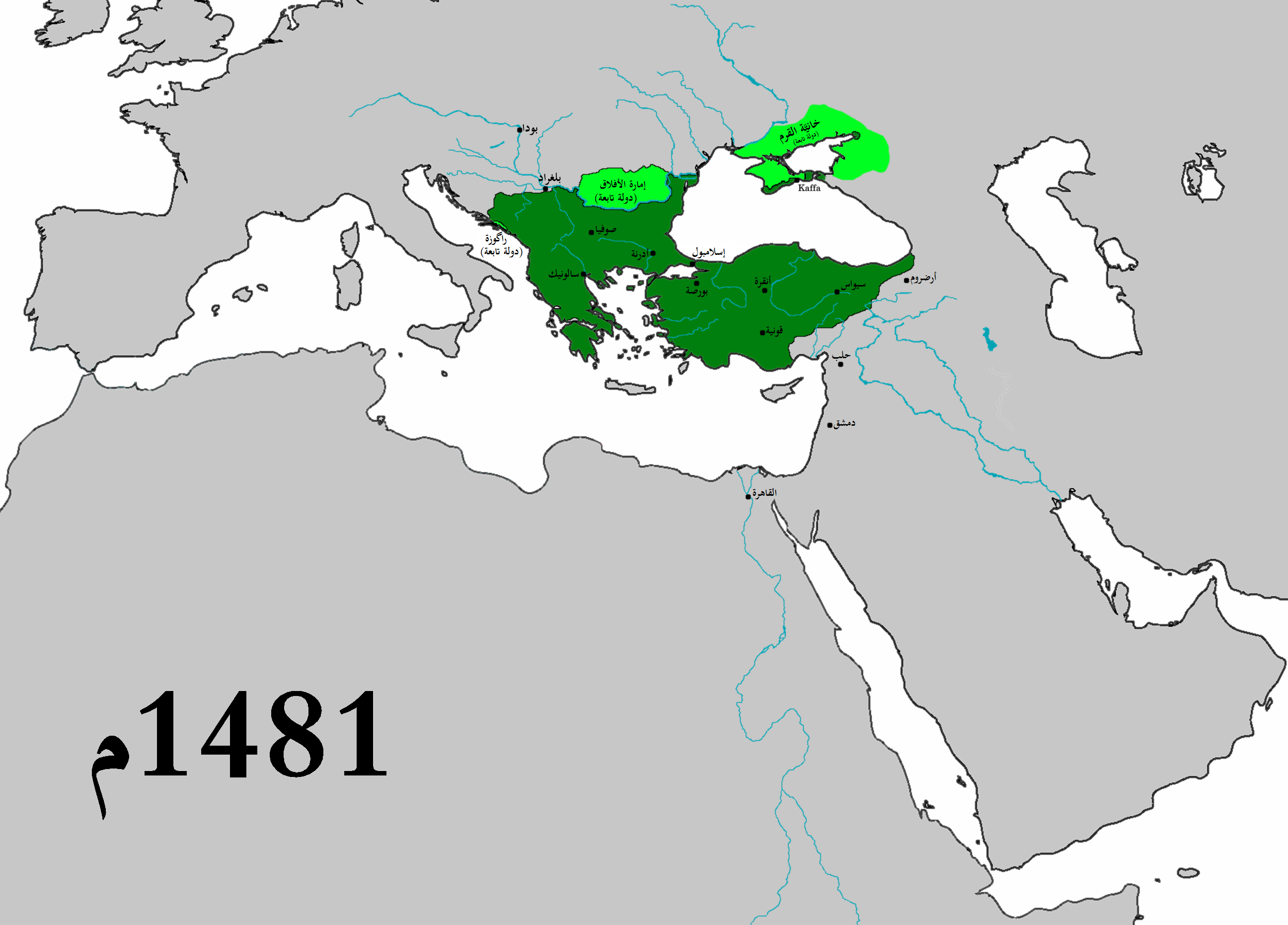 الدولة العُثمانيَّة سنة 1481م.